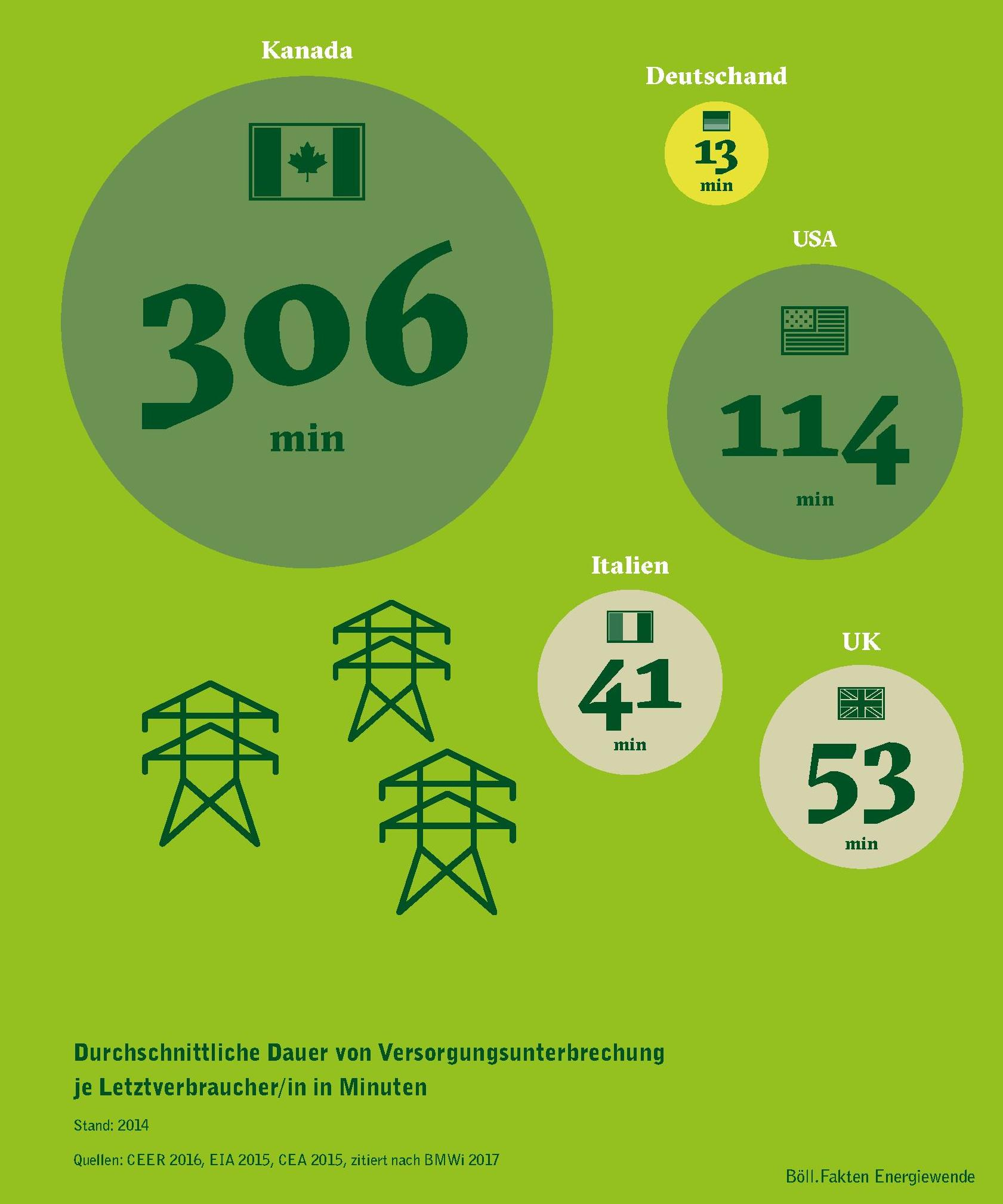 „Energiewende: Siebzehn Richtigstellungen zur Stromversorgung“ – Fakten und Argumente zur Diskussion um Erneuerbare Energien bzw. die Energiewende in Deutschland. URL Shortener für diese Seite: PDF: „Dieses Werk steht unter der Creative-Commons-Lizenz CC BY-SA 4.0“ - siehe Seite 43 (PDF-Seite 22) Vorwort: „Die Menschen in Deutschland stehen mit großer Mehrheit zur Energiewende. Das ökonomische, ökologische und soziale Potenzial der Energiewende ist riesig. Der Umstieg auf Erneuerbare Energien und auf ein flexibles Stromversorgungssystem ist der Grundpfeiler für die ökologische Modernisierung des Industriestandortes Deutschland. Eine klimafreundliche Stromversorgung hilft, die Grundlagen für menschliches Leben auf diesem Planeten zu erhalten. Die Energiewende kann in sozialer Hinsicht doppelt wirksam sein: Erstens schafft sie viele Beteiligungsmöglichkeiten, vor Ort und in digital vernetzten Strom-Gemeinschaften. Zweitens ist nachhaltige Stromversorgung ein Kernelement der Klimagerechtigkeit. Die Energiewende hat ein Riesenpotenzial, ist aber auch sehr komplex und wirft viele Fragen auf. Die politische Umsetzung der Energiewende wird vielfach kritisiert: Der Plan, der Weg und die Technik seien oftmals unklar, die Verteilungswirkungen werden als unausgewogen empfunden. Deswegen haben wir in sozialen Medien recherchiert, was alles unklar ist, was Unbehagen und Zweifel verursacht. Unser Anliegen ist es, das allgemeine Wissen über die Energiewende zu erweitern. Wir wollen Mut und Zuversicht für eine sozial ausgewogene, ökologisch nachhaltige und wirtschaftlich erfolgreiche Energiewende geben. Denn wir brauchen die Energiewende und arbeiten deshalb mit daran, dass sie ein Erfolg wird.“ Stefanie Groll, Referentin für Ökologie und Nachhaltigkeit, Heinrich-Böll-Stiftung Doris Lorenz, Vorstand der Heinrich-Böll-Stiftung Schleswig-Holstein